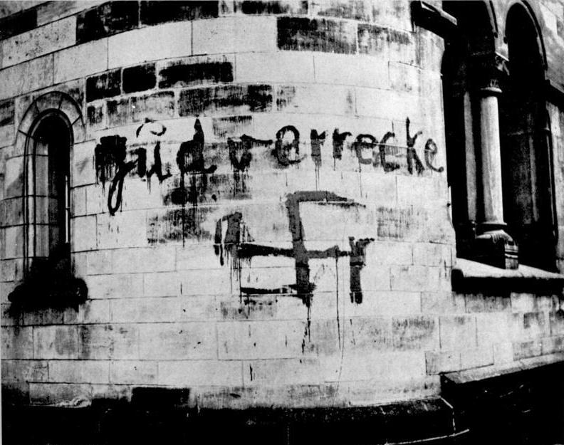 Düsseldorf, geschändete Synagoge ADN-ZB Im faschistischen Deutschland 1933 Antisemitische Inschrift an der Synagoge in Düsseldorf [Düsseldorf.- antisemitische Aufschrift "Jud verrecke" und Hakenkreuz an Synagoge]